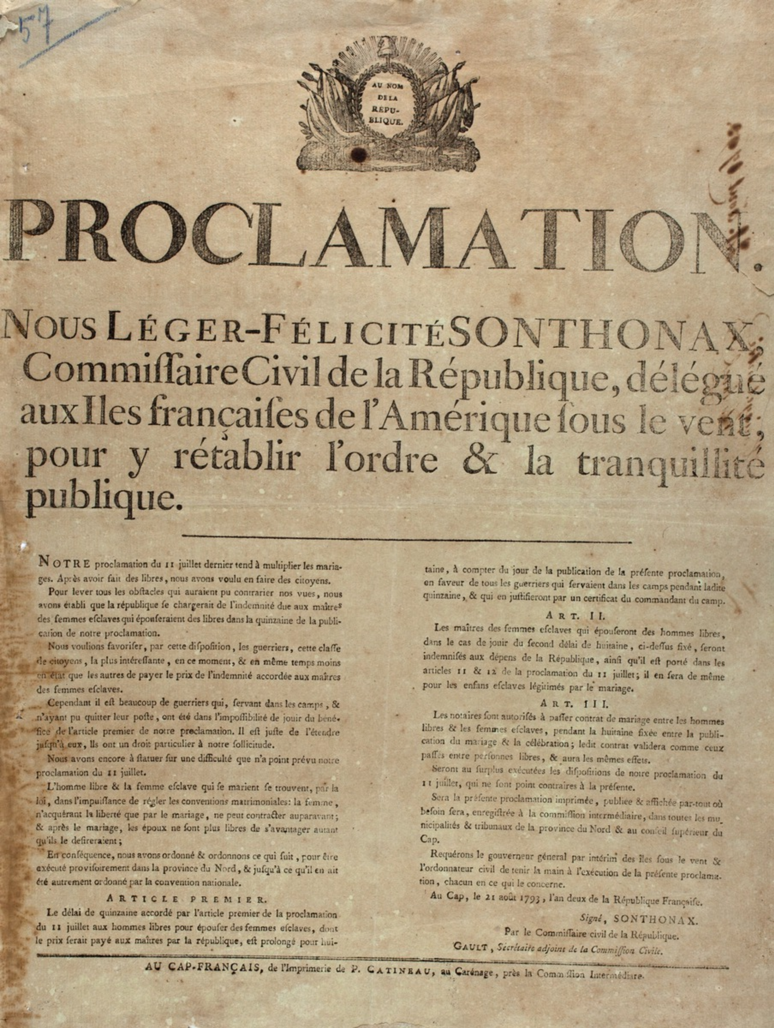 Léger Félicité Sonthonax, Archives nationales d’Haïti.- Proclamation. Au nom de la République. Nous Léger-Félicité Sonthonax, Commiʃʃaire Civil de la République, délégué aux Iles françaiʃes de l'Amérique ʃous le vent, pour y rétablir l'ordre & la tranquillité publique, Imprimerie P. Catineau, Cap-Français, 21 août 1793.